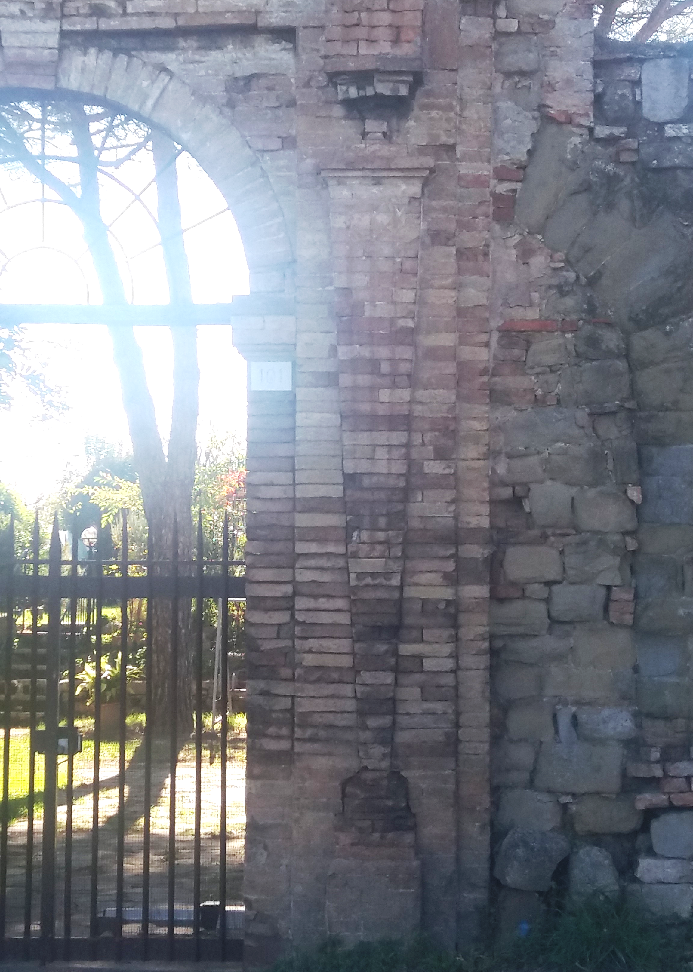 Portale del Leone di Galeazzo Alessi, Perugia, (dettaglio elemento tronco-piramidale capovolto al lato dell'ingresso)